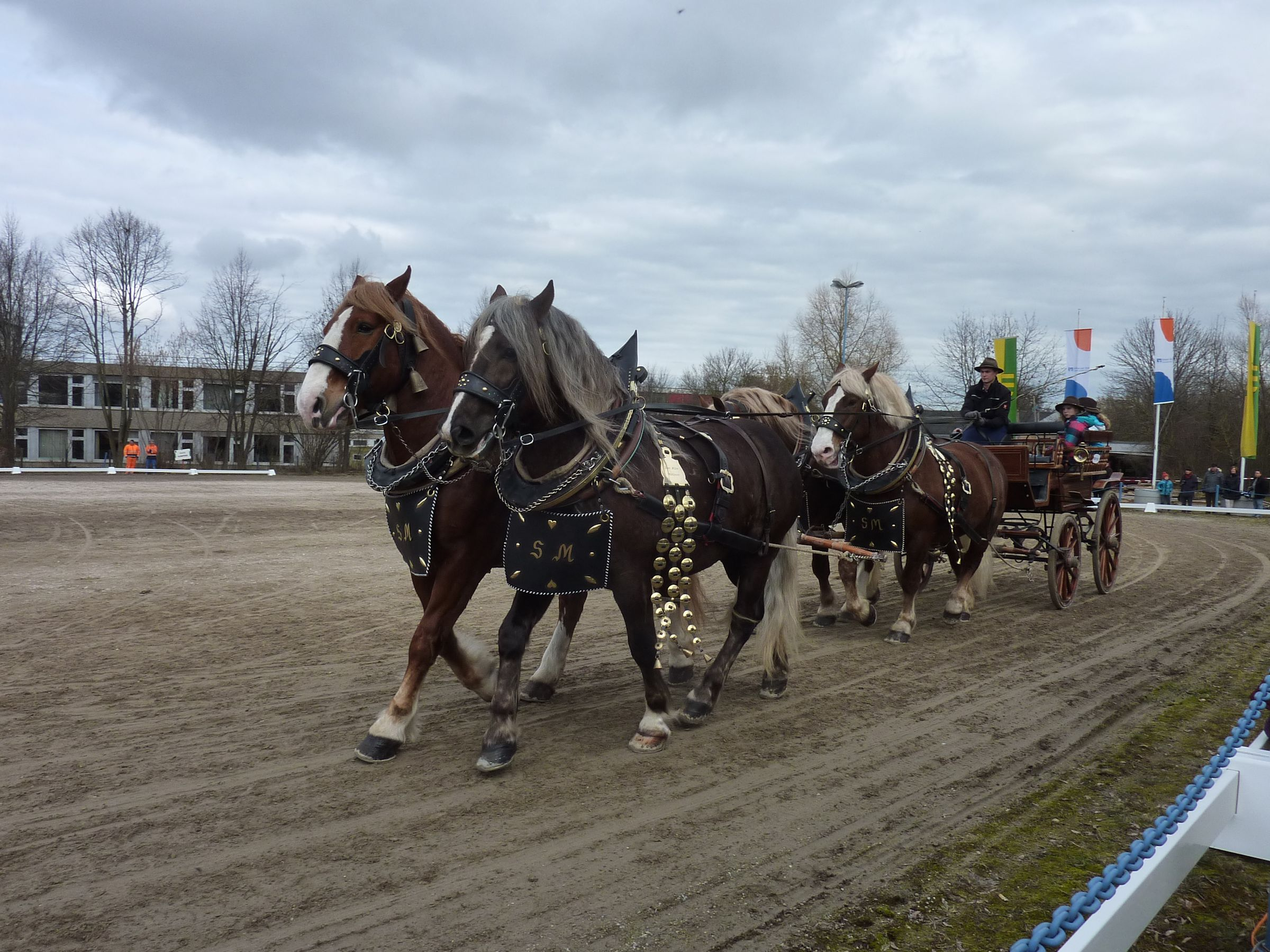 Pferdemarkt Bernhausen 2014